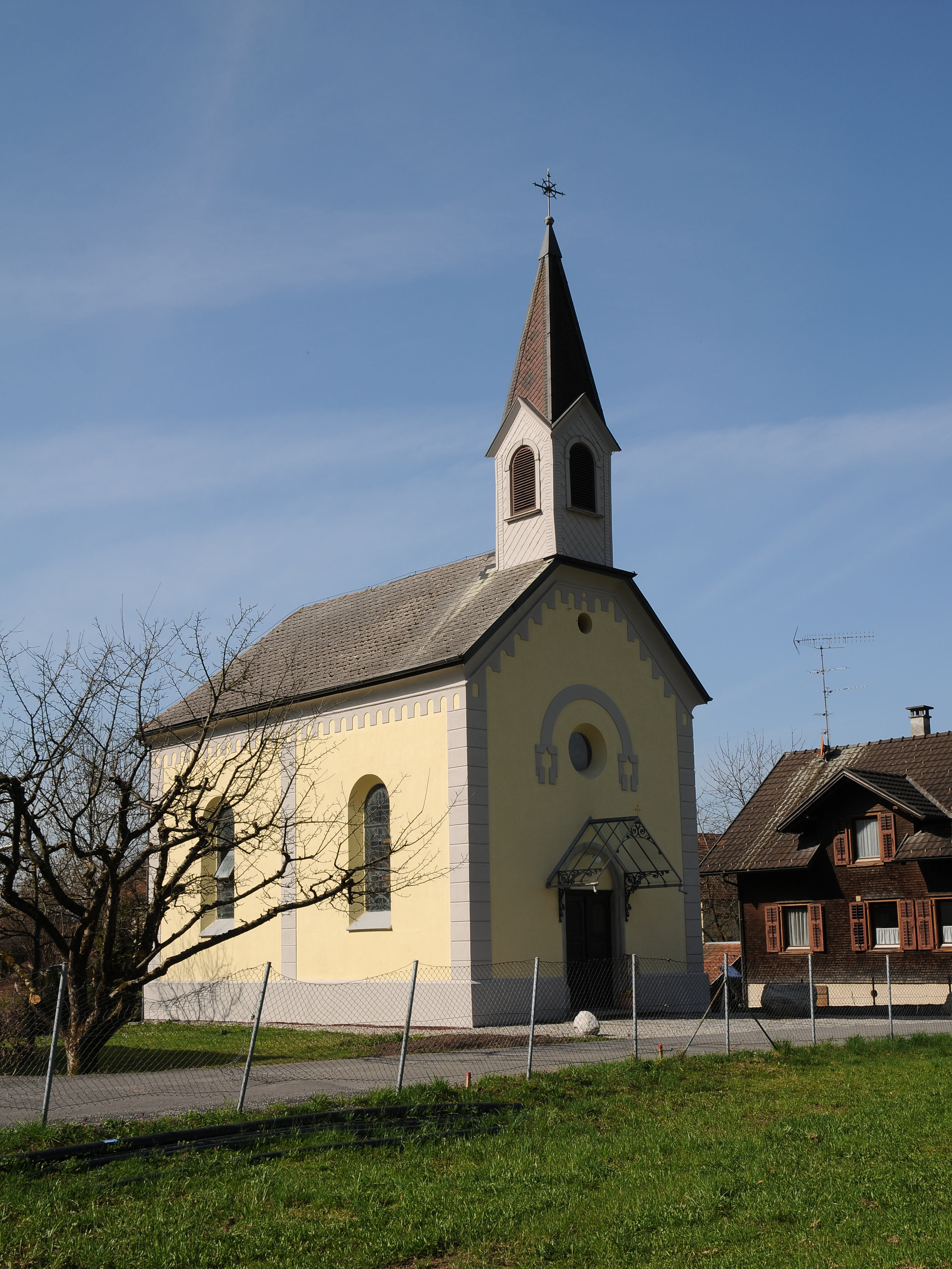 aus dem DEHIO Vorarlberg 1983: KAPELLE, Zu den Sieben Schmerzen Mariä, in Vorderachmühle, beim Gashof Grünen Baum. 1907 erbaut. Rechteckbau mit polygonalem Chor unter Satteldach. Tonnengewölbter Betraum mit je 2 Rundbogenfenstern, eingezogener Chorbogen auf Wandpfeilern, 3/4-Chor mit Stichkappengewölbe. Gerade Empore. Glasgemälde bezeichnet J.Schnitzler Glasmalerei Dornbirn, links Hl.Augustinus, rechts Hl.Wendelin. An der Altarwand Figur Pietá bezeichnet Reich Dornbirn 1907. Figuren Chorbogenkruzifixus, Anfang 20.Jh. Am Chorbogen links Hll. Anna mit Maria, rechts Hl.Josef, 20.Jh. Gemälde links vom Eingang: Anbetung der Könige, von Johann Martin Ulmer 1734, bezeichnet renoviert 1907 M.Mohr, Maler.